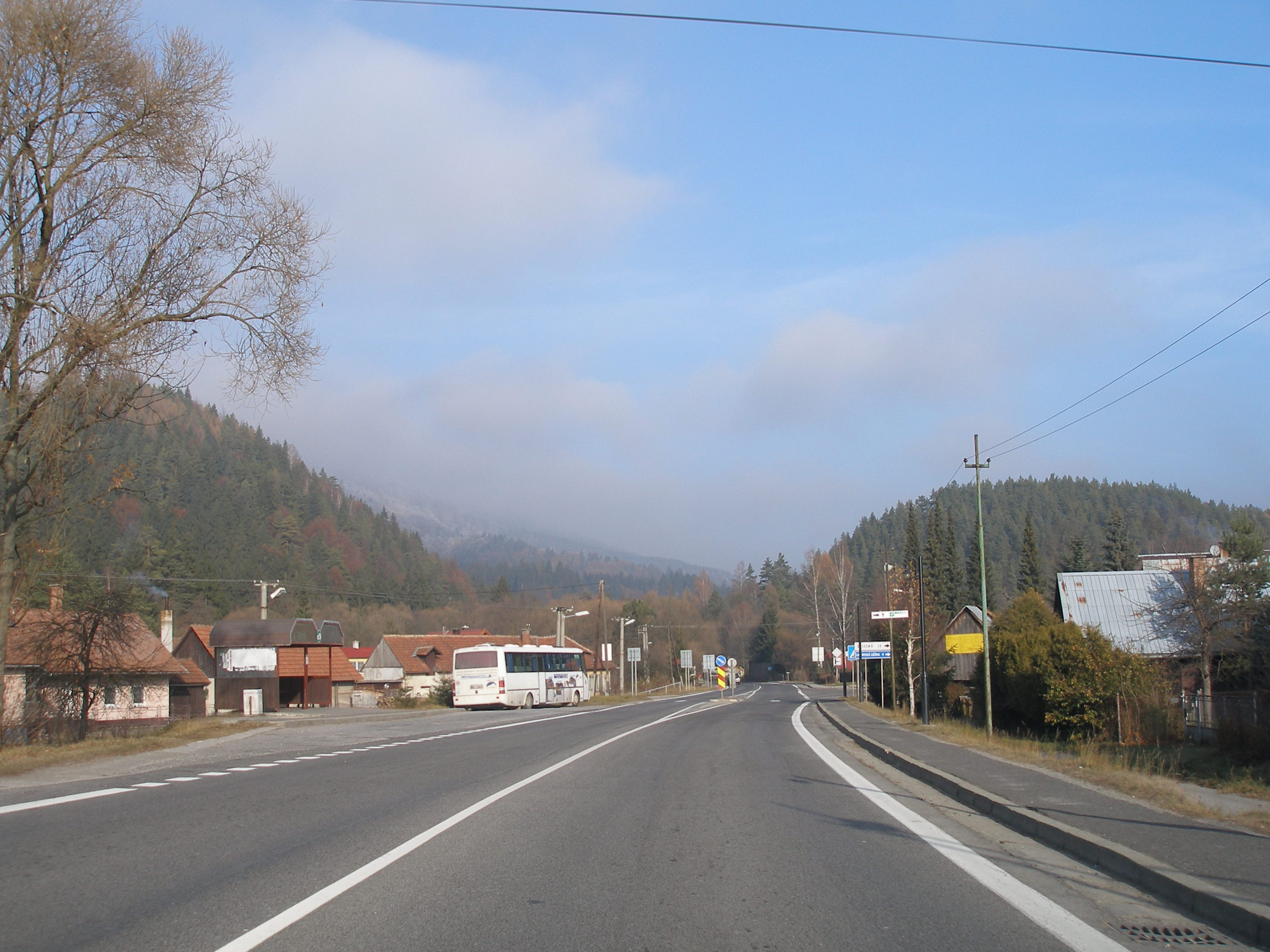 Obec Liptovská Osada, okres Ružomberok.